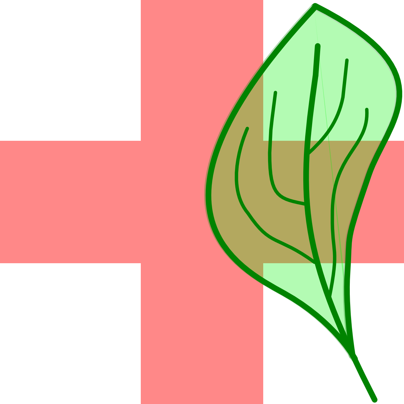 Logo per fitoterapia